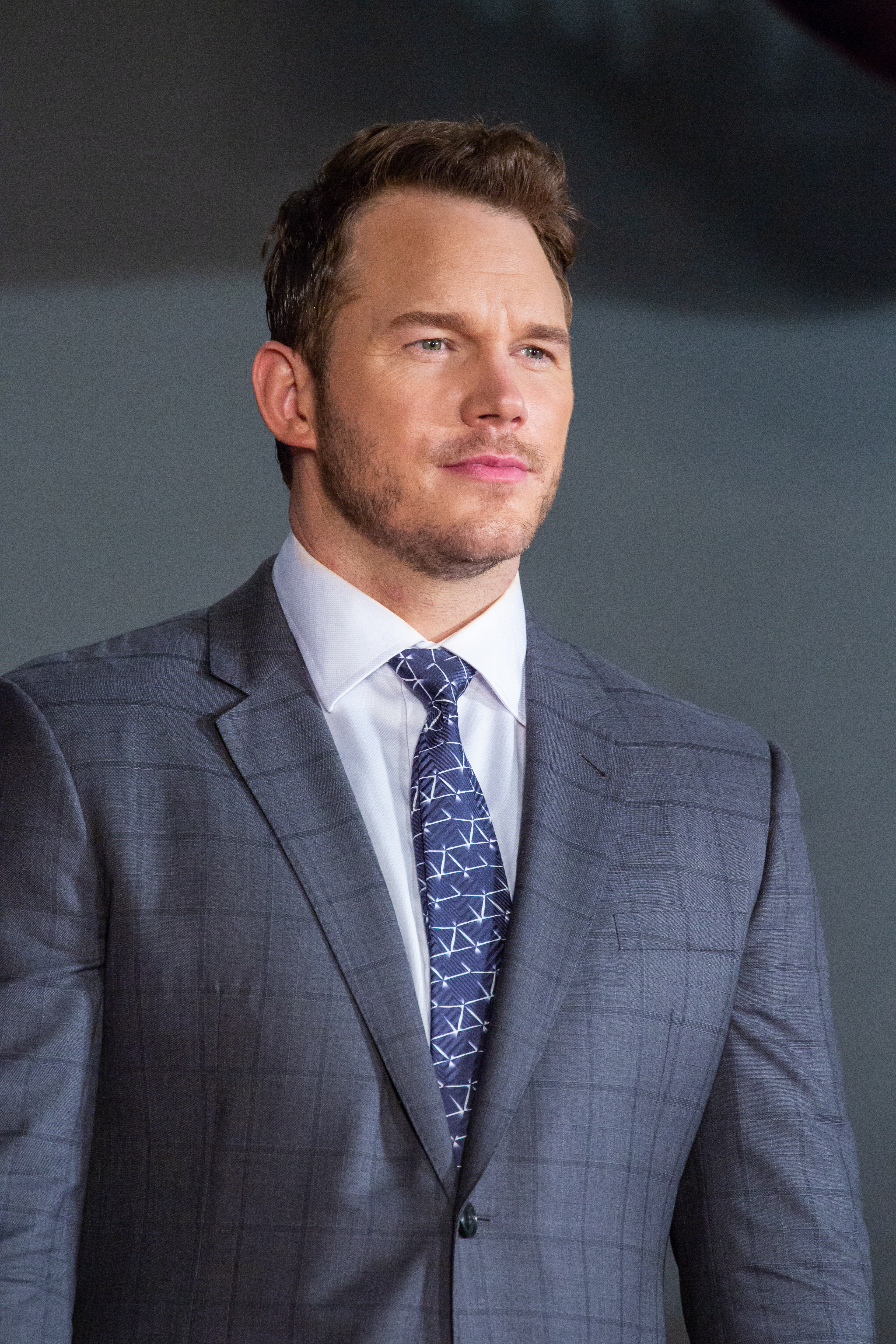 ジュラシック・ワールド/炎の王国 ジャパン・プレミア レッドカーペット クリス・プラット